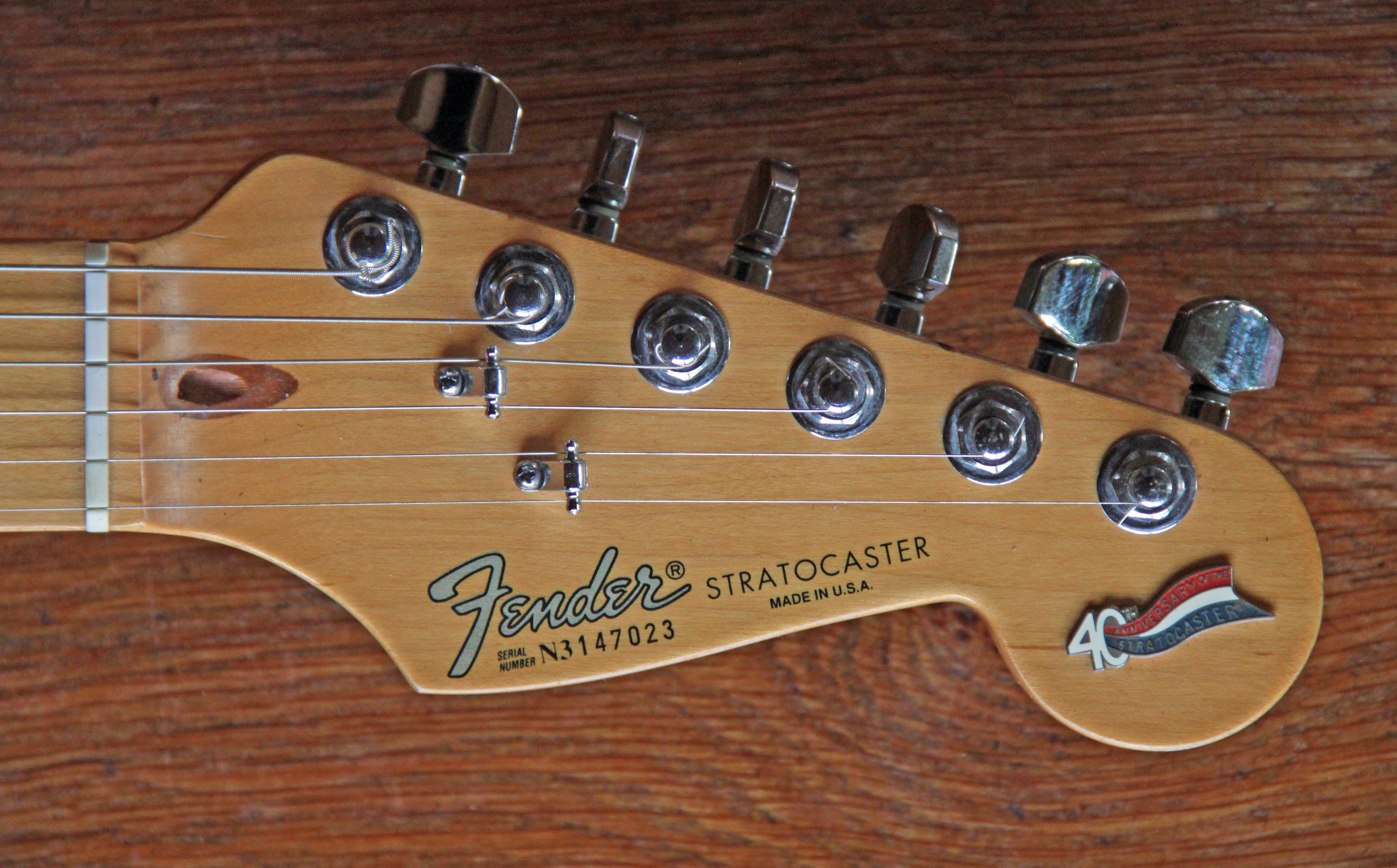 Jubiläums Fender-Stratocaster (40 Jahre) Kopfplatte.